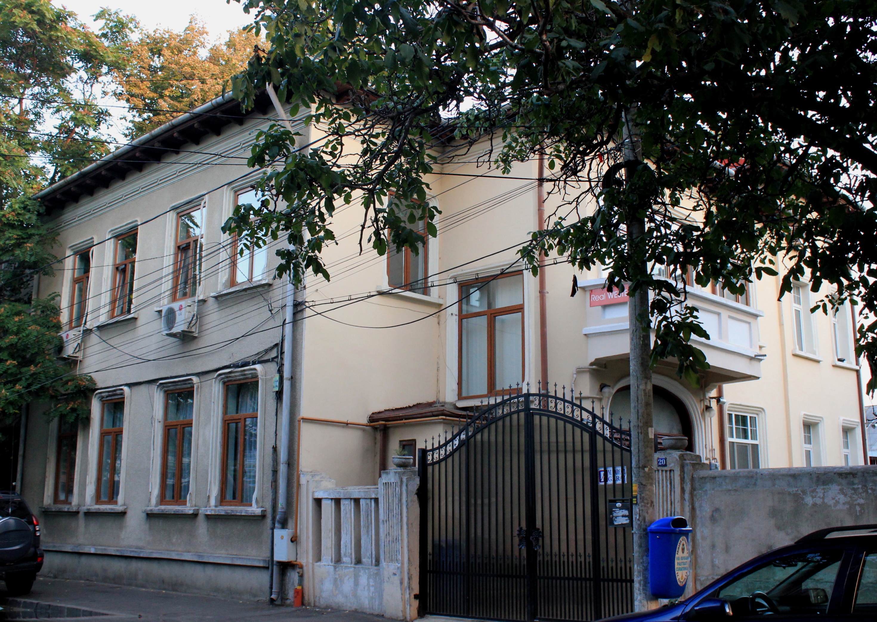 Casă Georgescu Mihail 20